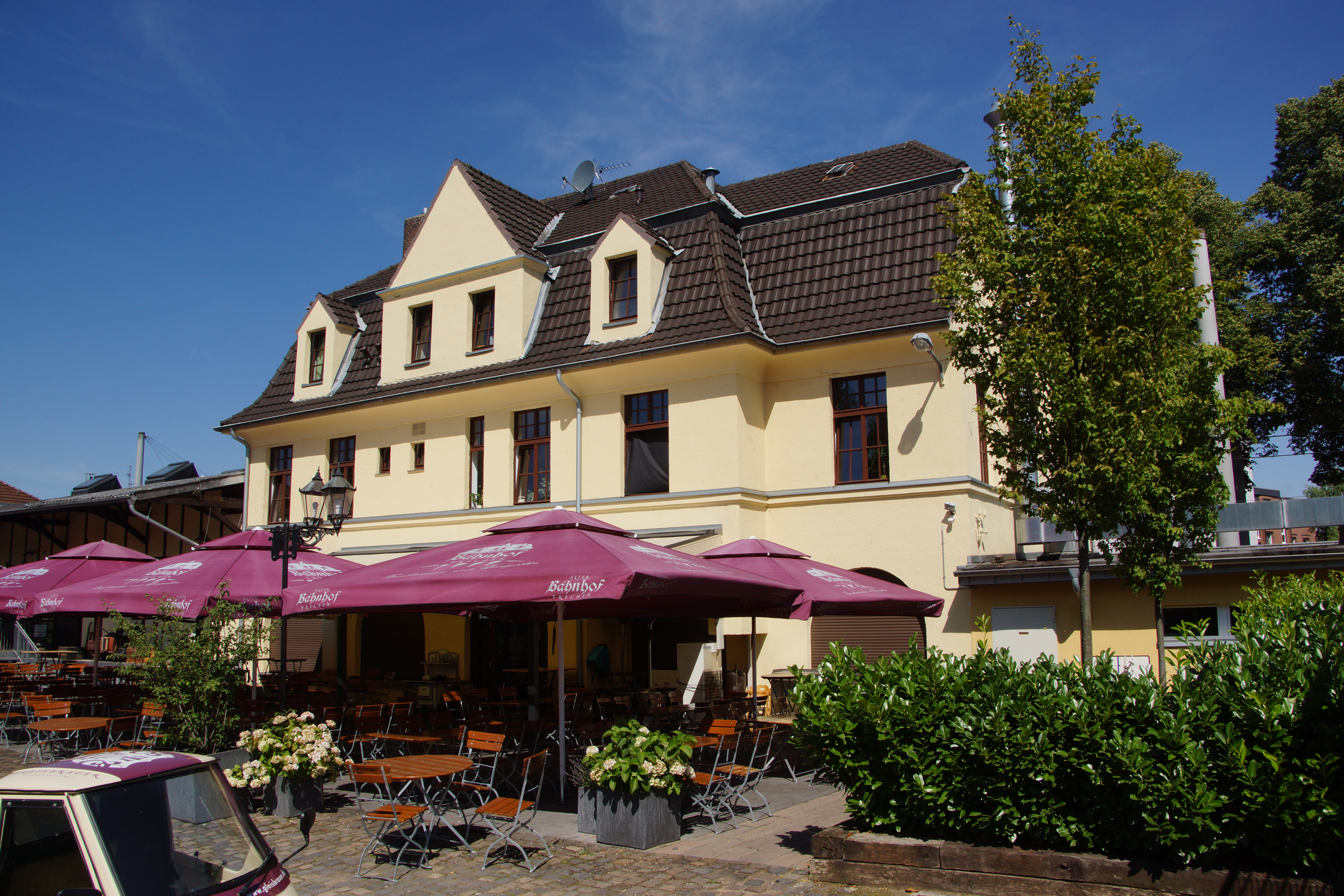 Alter Bahnhof Frechen This is a photograph of an architectural monument. 26